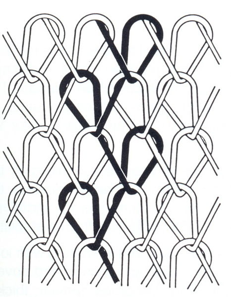 Dvojity trikot (osnovni jednolicni vazba)